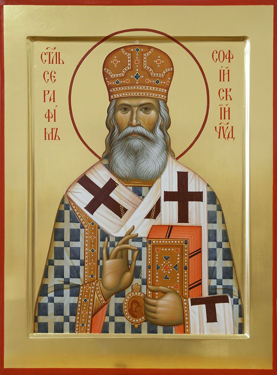 SAMSUNG CSC